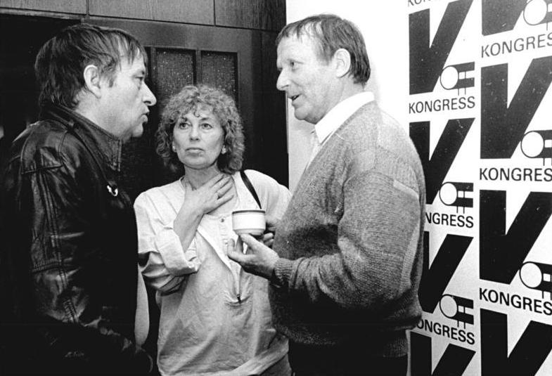 ADN-ZB-Senft-20.4.88-Berlin: V. Kongreß des Verbandes der Film- und Fernsehschaffenden der DDR-19.-21.4.88-Unter den Delegierten des Kongresses sind die Filmwissenschaftlerin Dr. Christiane Mückenberger sowie der Regisseur Wolfgang Kohlhaase (r.) und Heiner Carow.